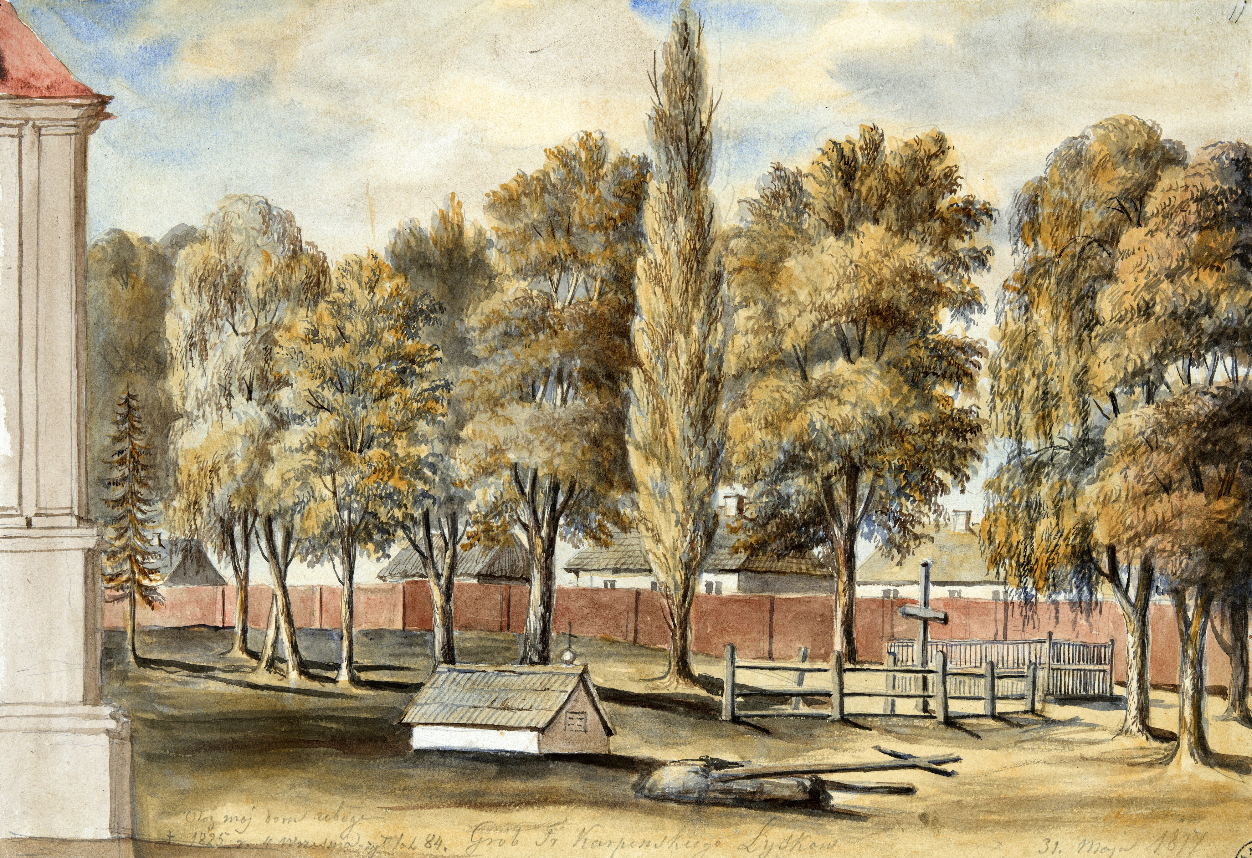 Беларуская (тарашкевіца): Лыскаў (Łyskaŭ), надмагільле Францішка Карпінскага (Francišak Karpinski)